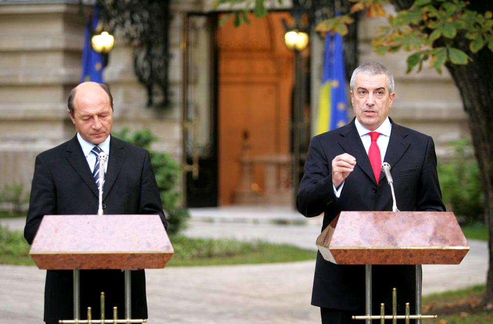 Fotografie realizata cu ocazia declaratiilor de presã referitoare la Raportul de monitorizare al Comisiei Europene.JPG""